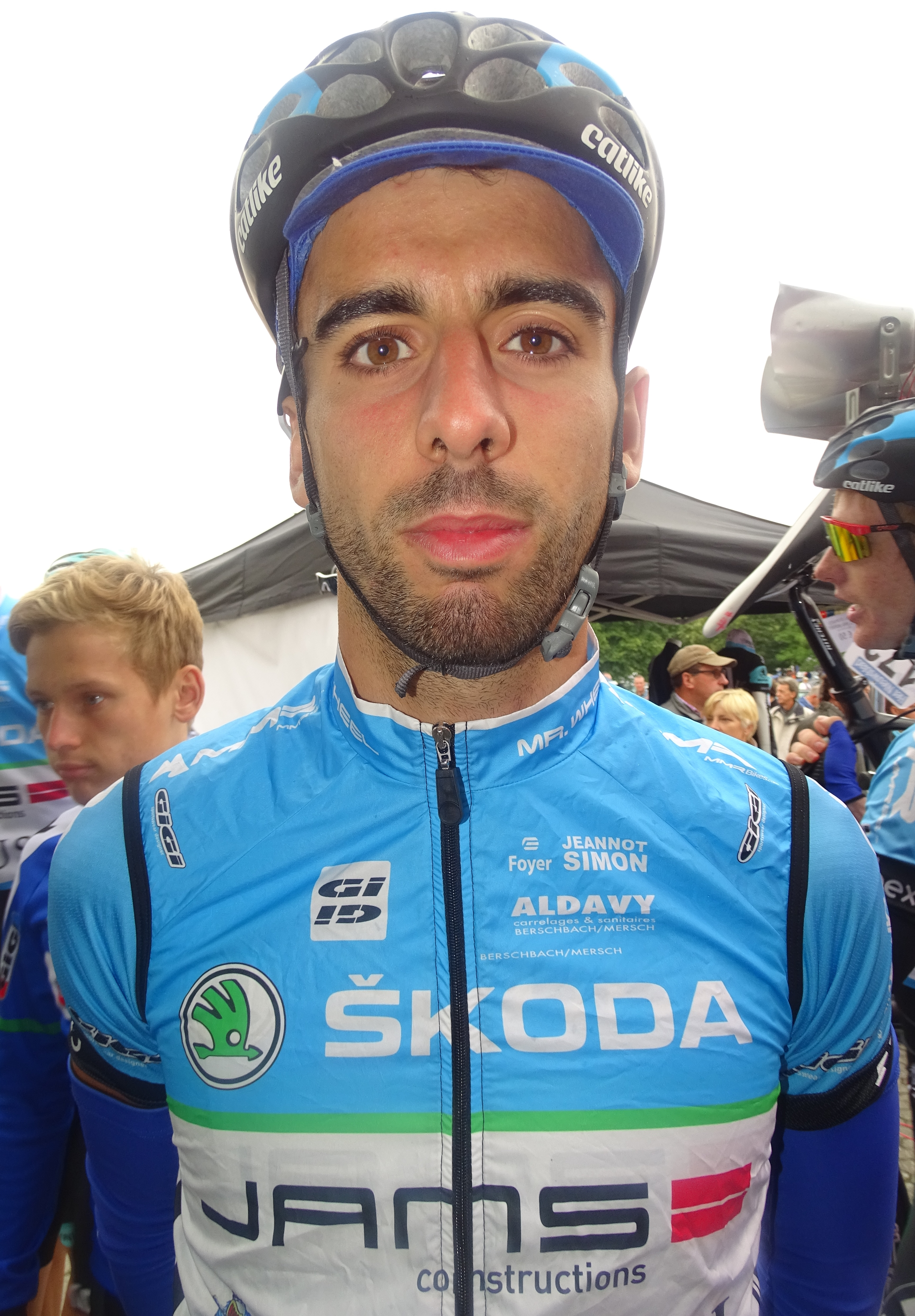 Reportage réalisé le mardi 18 août à l'occasion du départ et de l'arrivée du Grand Prix de la ville de Zottegem 2015 à Zottegem, Belgique.